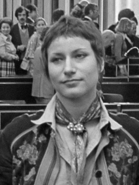 Minister Gardeniers van CRM deelt toneelprijzen uit; Eric van der Donk, Mary Dresselhuys, Til Gardeniers, Bea Meulman, Camilla Koevoets en Frans Vorstman 22 mei 1978